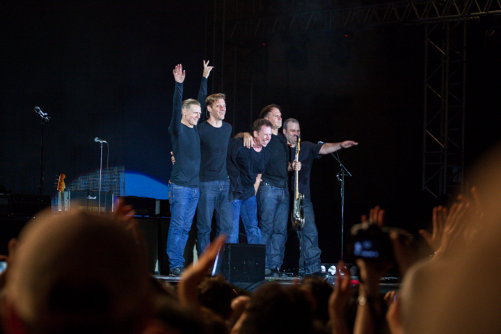 20130710-ByanAdamsLucca-0122